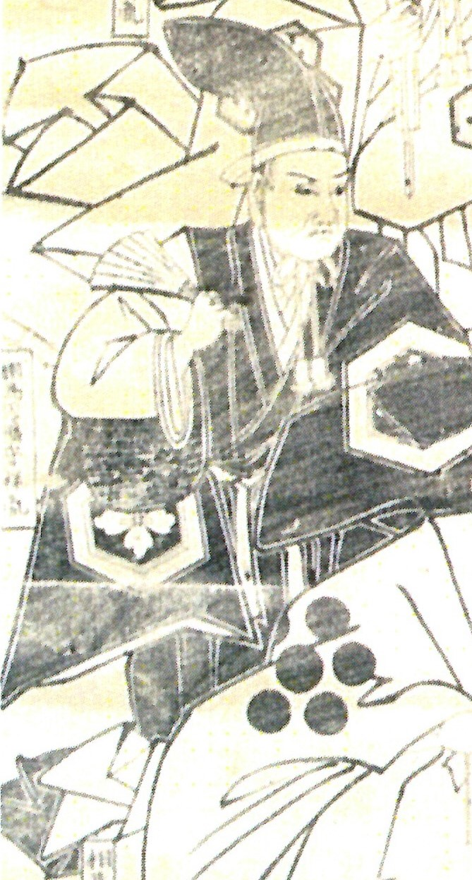 相馬祥胤の画像(「相馬家歴代藩主像」より)。